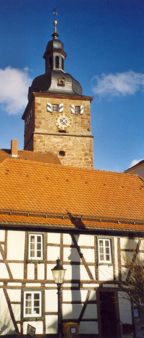 Buchen, Deutschland. Aussenseite der Turmspitze des Mainzer Tores; mittelalterlicher Turm mit barockem Zwiebeldach.